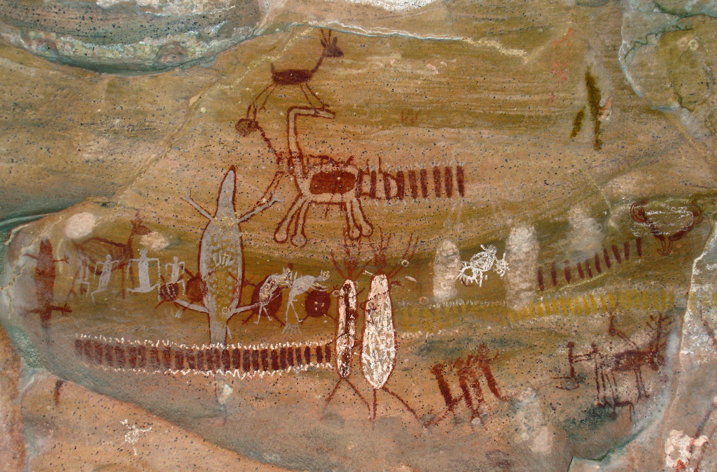 Pictogramas em gruta na Serra da Capivara